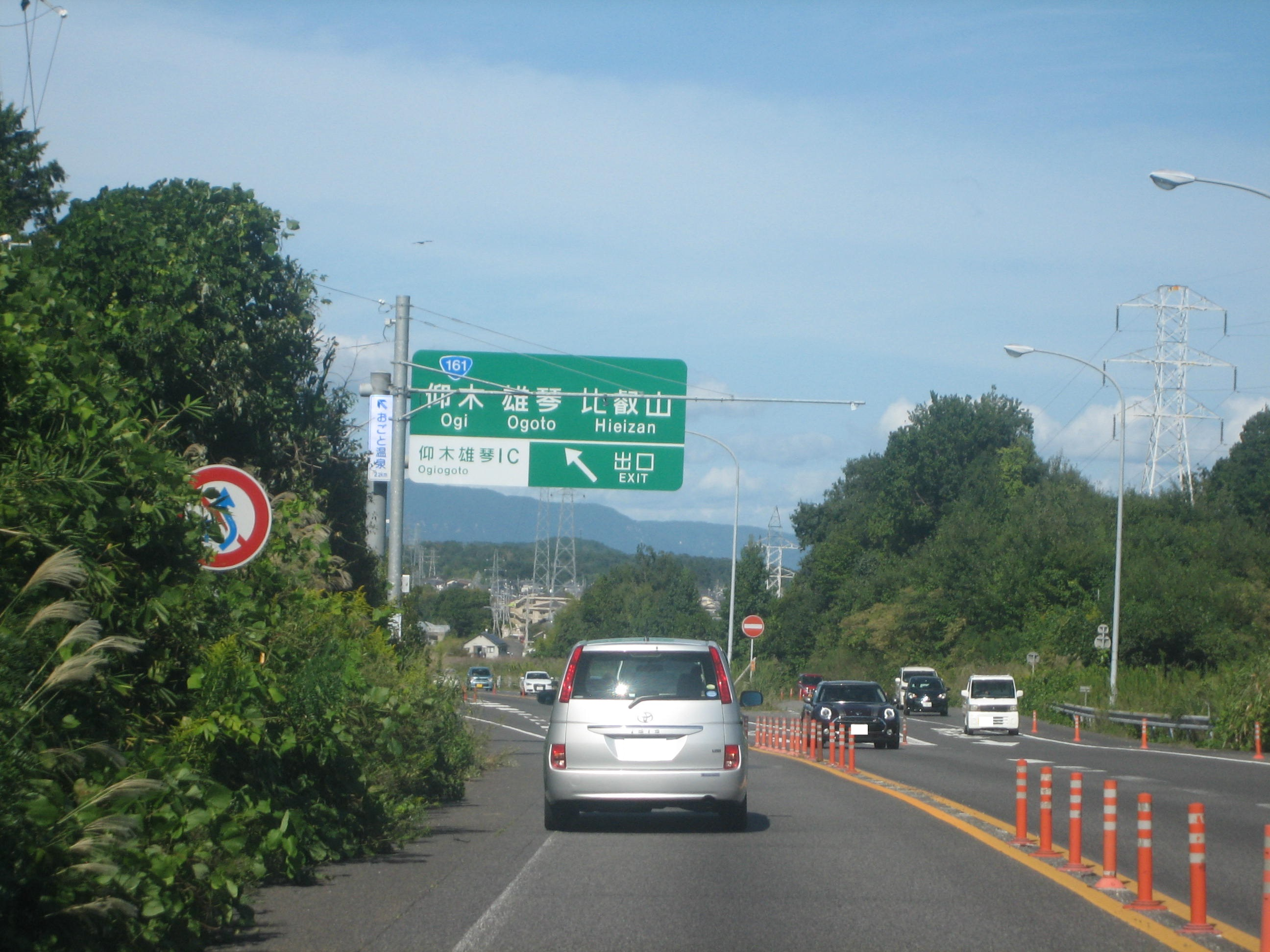 仰木雄琴IC分岐